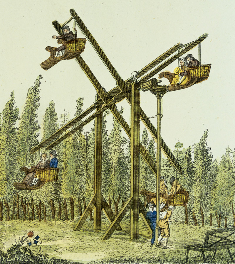 Riesenrad, frühe Version von 1802.